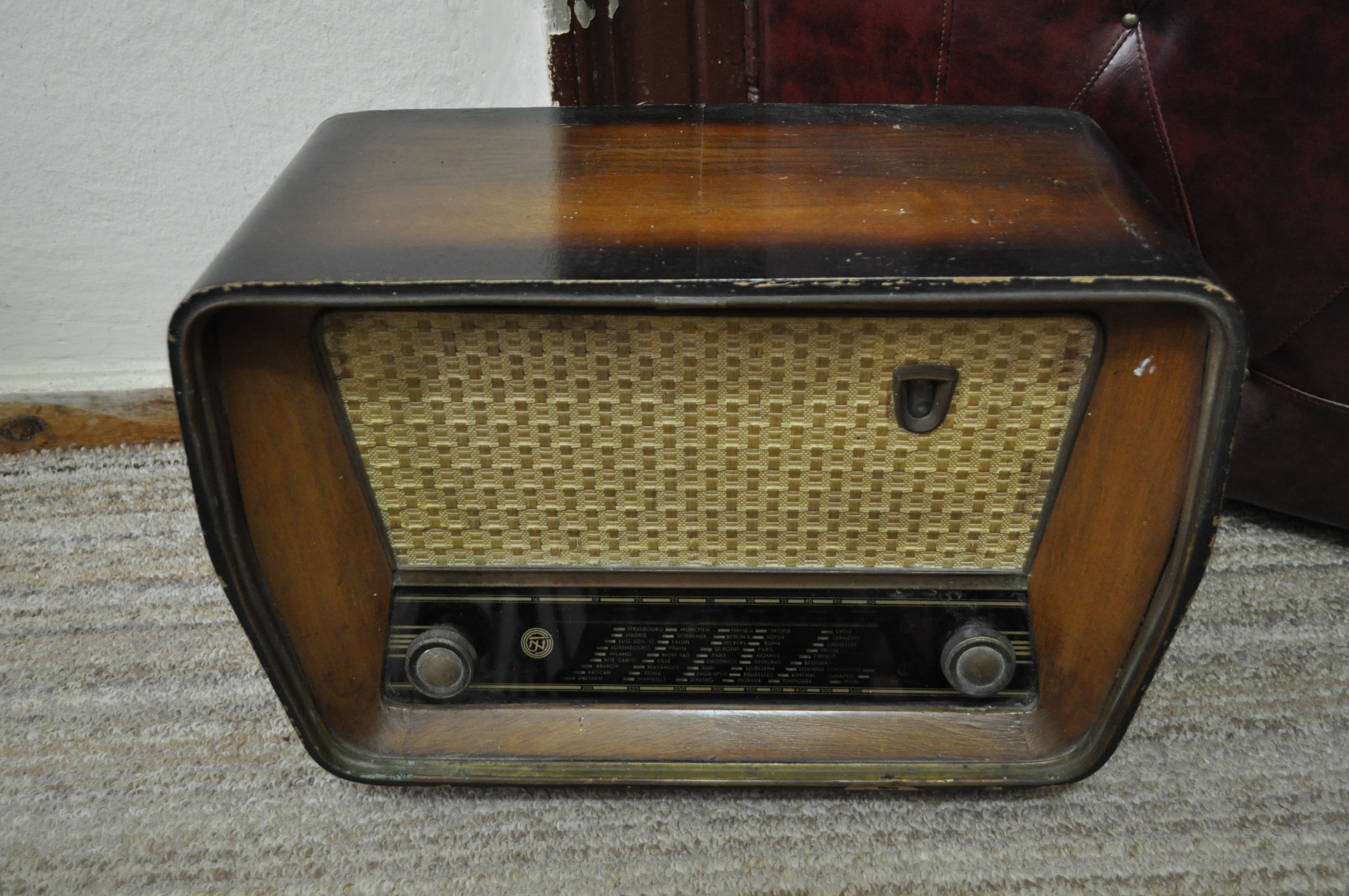 Народни музеј Топлице, етнолошка збирка